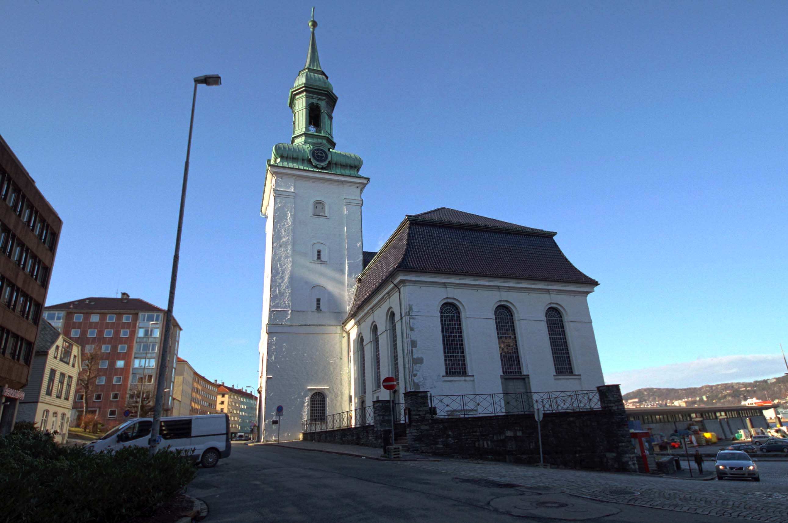 Nykirken